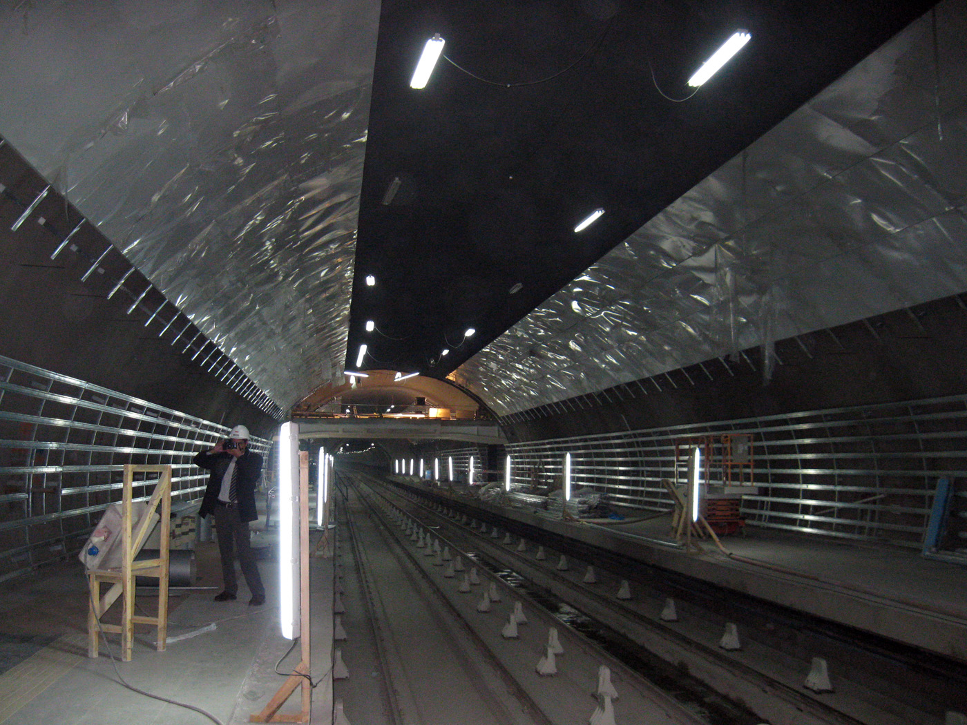 Construcción de la estación Hernando de Magallanes, extensión Línea 1 Oriente, Metro de Santiago. Fecha: Mayo 2009 Operativa desde diciembre de 2009